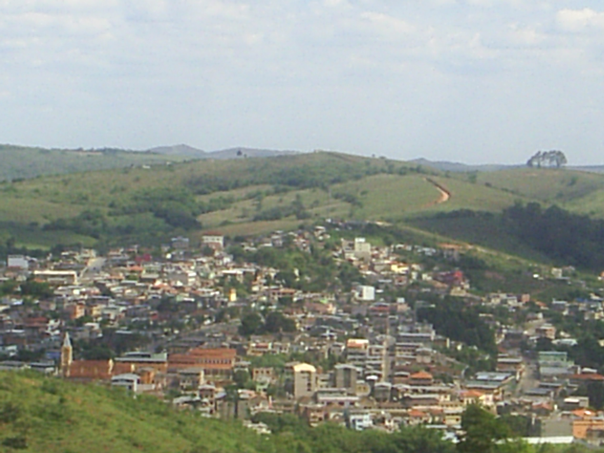 Vista parcial de Dores de Campos - MG , Brasil